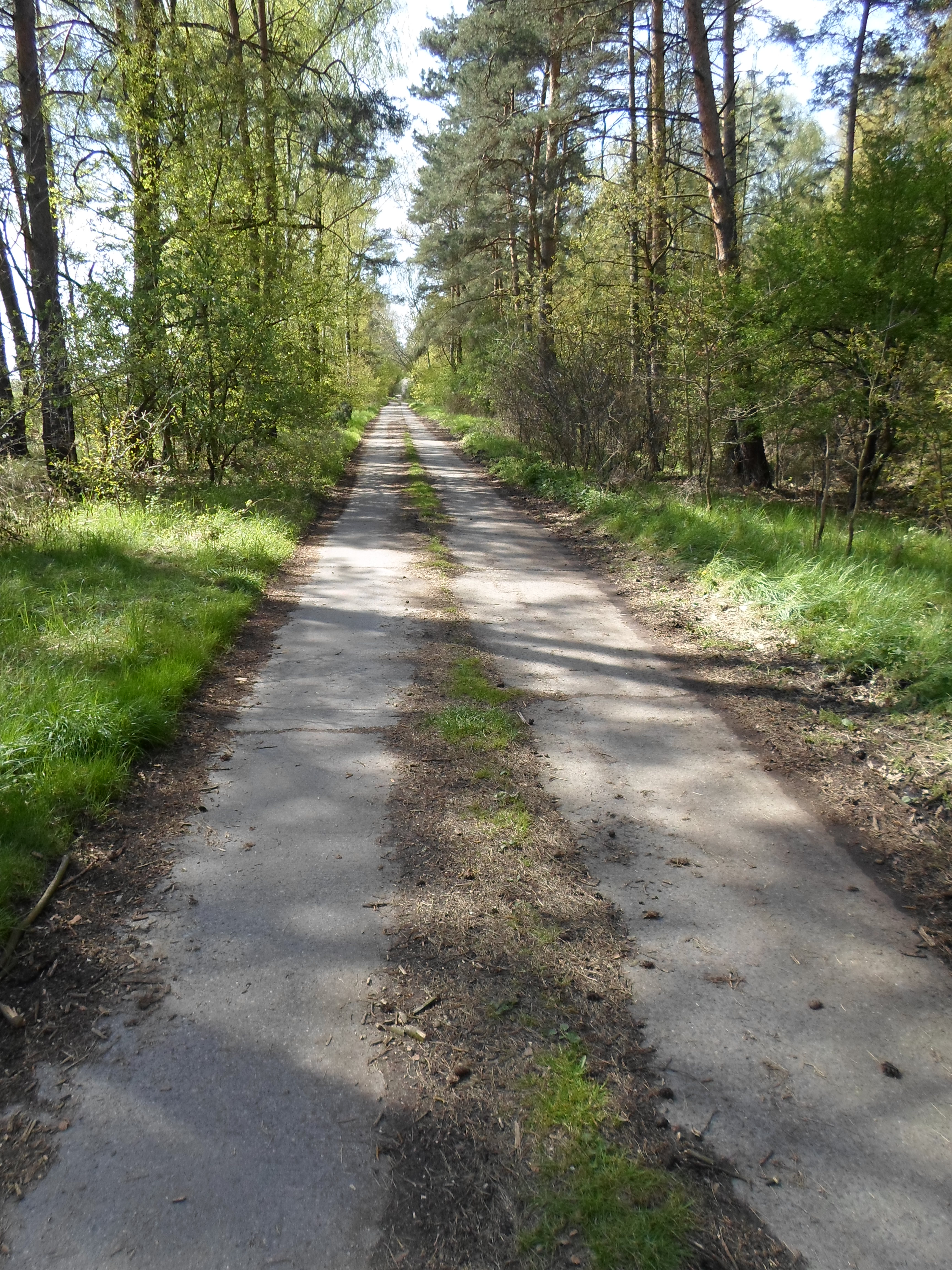 Betonowa obwodnica Muny.